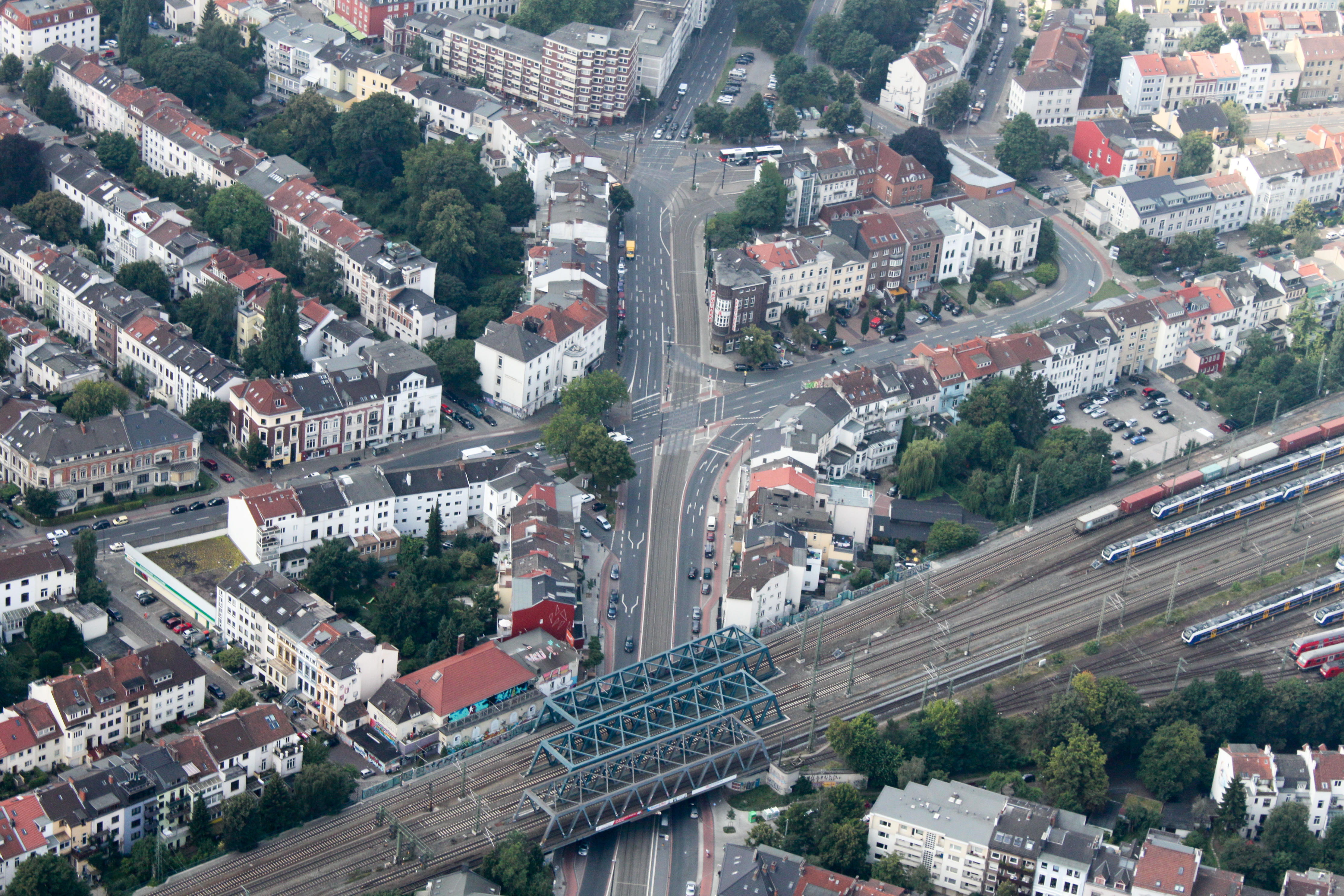 Luftbild aus Bremen: Im Vordergrund zu sehen ist das stadteinwärtige Ende der Schwachhauser Heerstraße, die im Concordia-Tunnel unter der Eisenbahnlinie durchführt. Sie führt bis zur Kreuzung mit der Bismarckstraße (links) und der Straße Außer der Schleifmühle (rechts) in der Bildmitte, ab dort ändert sie ihren Namen in Dobbenweg und wird zur Einbahnstraße, in Blickrichtung wird sie nur von der Straßenbahn befahren. In der hinteren Bildmitte kreuzt sie die verdeckte Querstraße Am Dobben und wird von der Eduard-Grunow-Straße (ganz hinten) fortgesetzt.